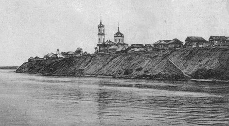 Село Березники